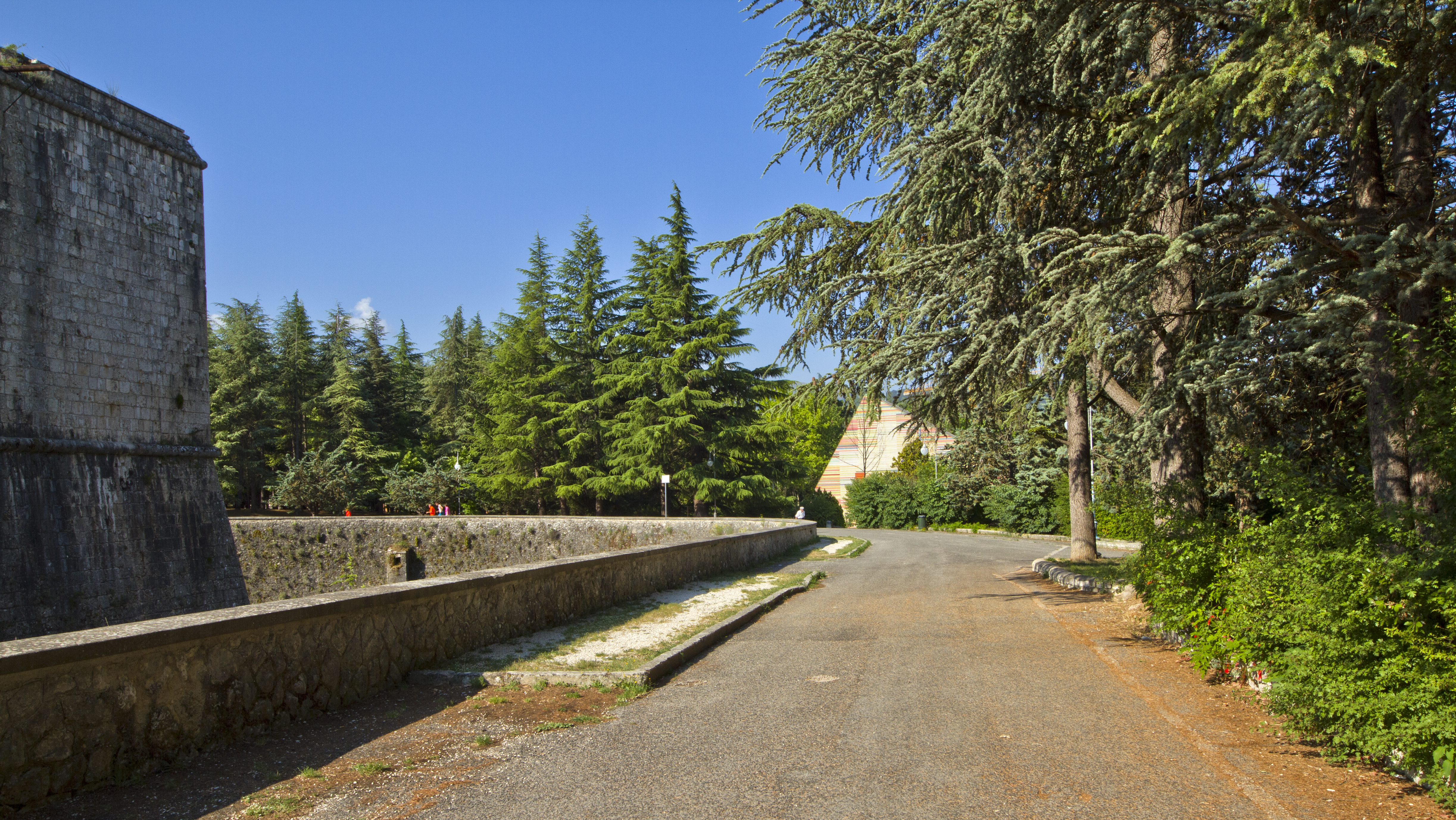 67100 L'Aquila, Italy